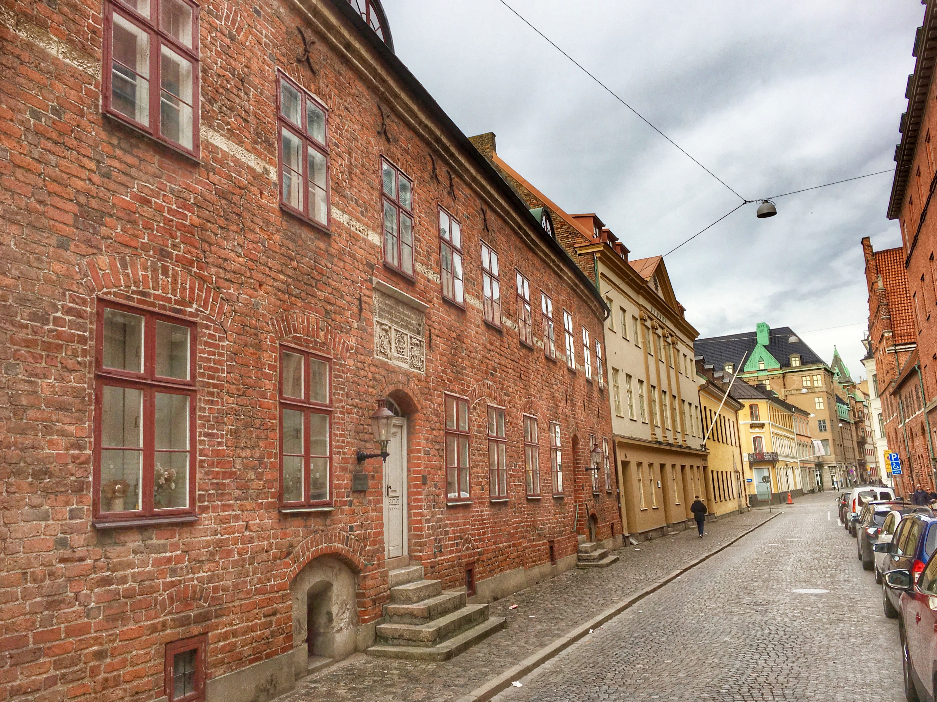 Västergatan i Malmø, til venstre Rosenvinges Hus